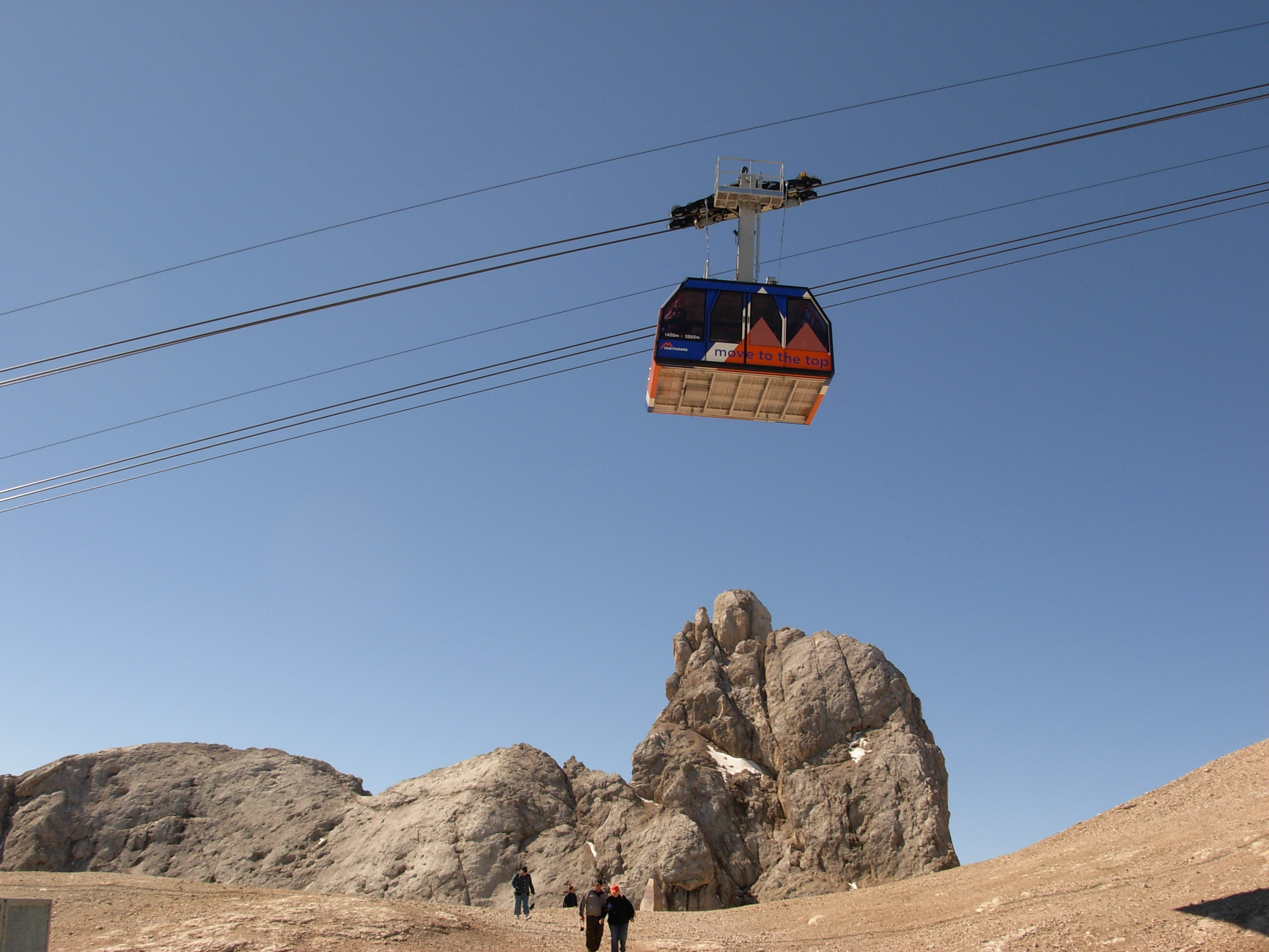 Cableway Malga Ciapela - Punto Rocca